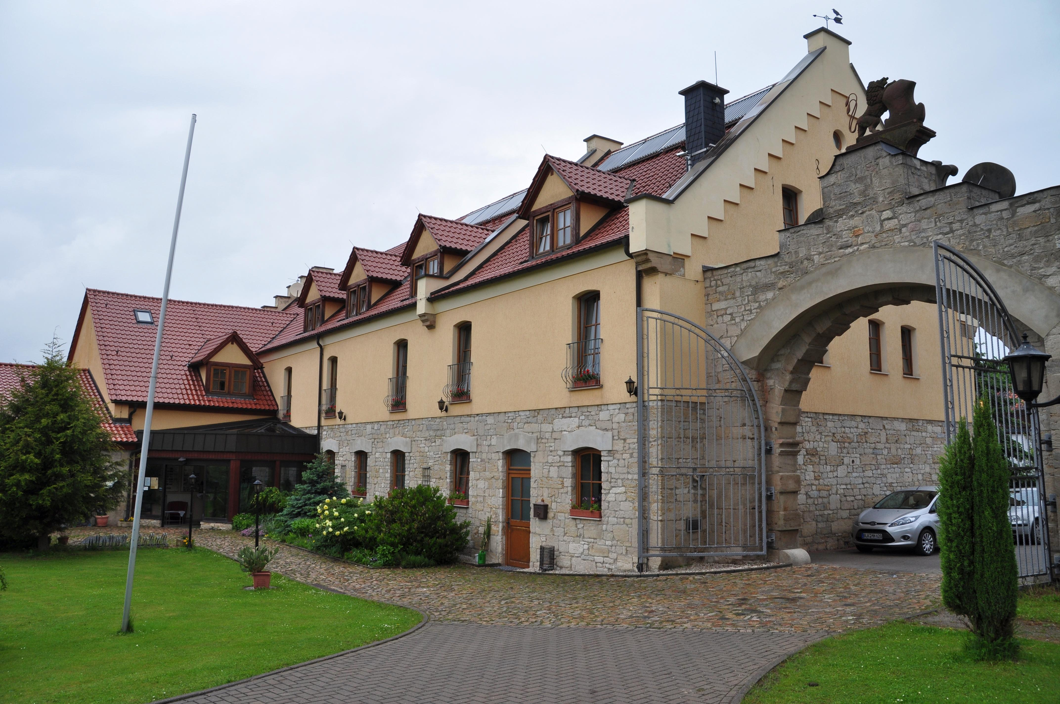 Rittergut Kreipitzsch bei Bad Kösen